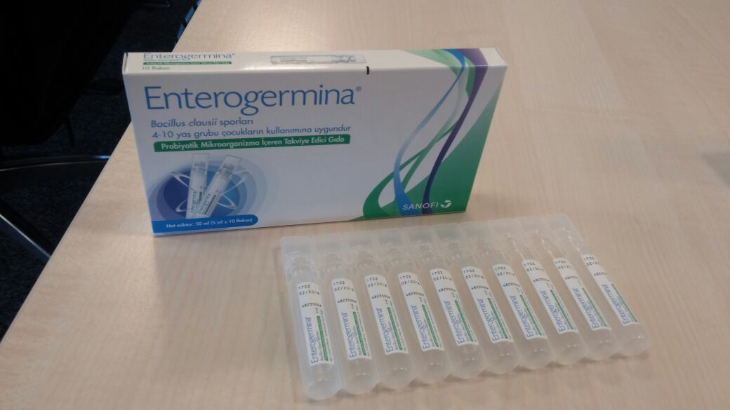 Enterogermina ürününün kutu ve içeriği olan flakon görselidir.